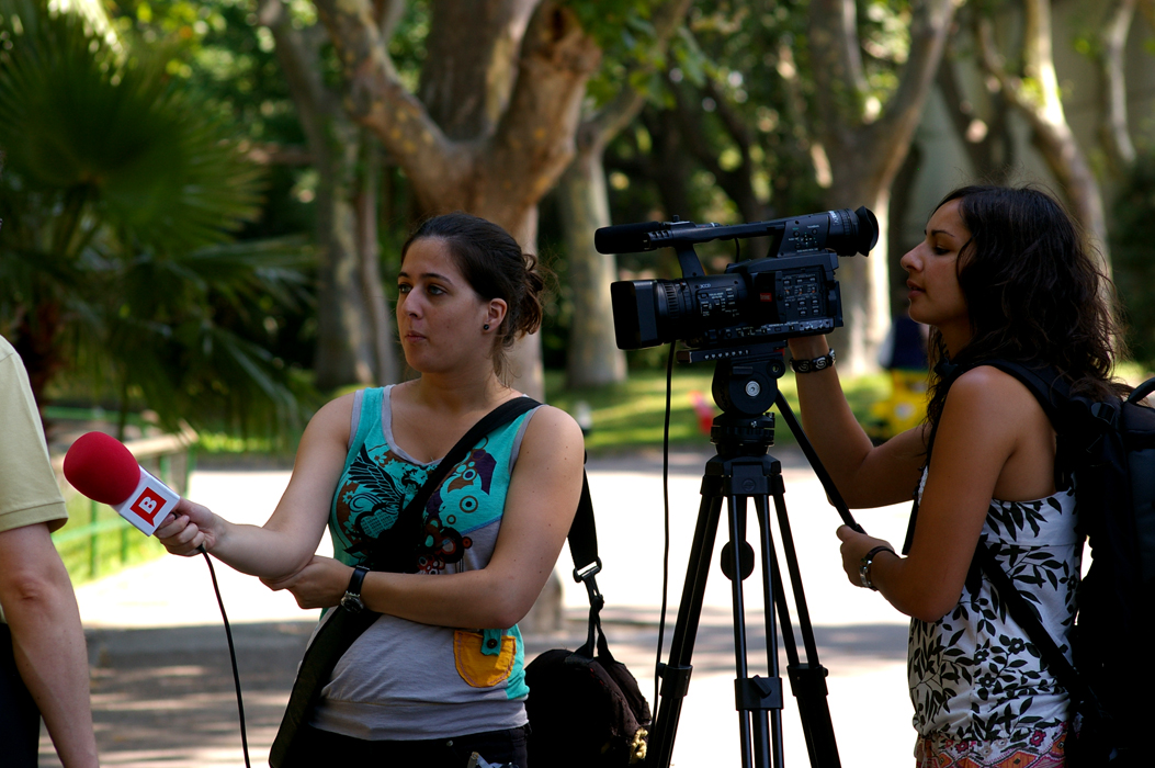 Barcelona TV